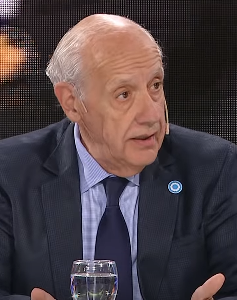 Lavagna siendo entrevistado en TN.